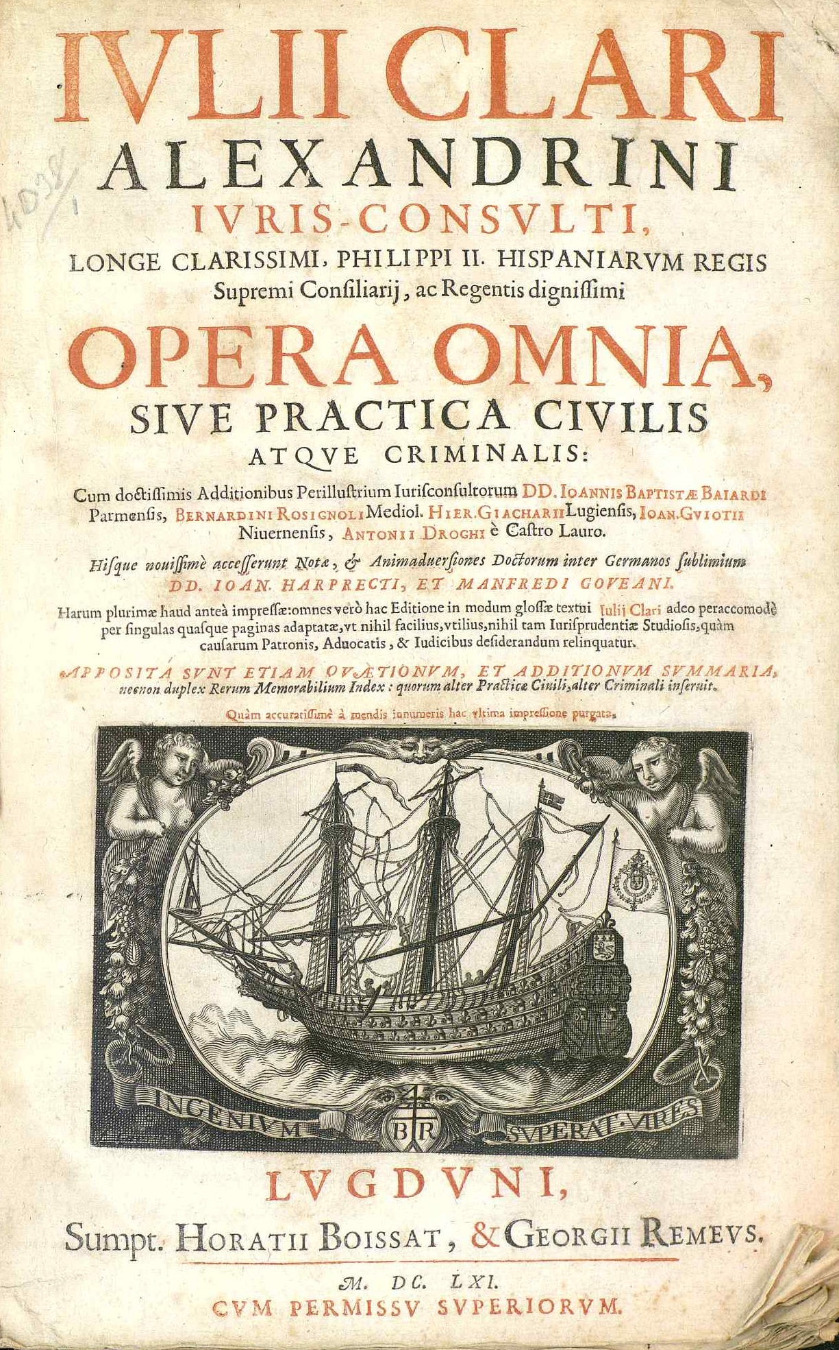 Frontespizio